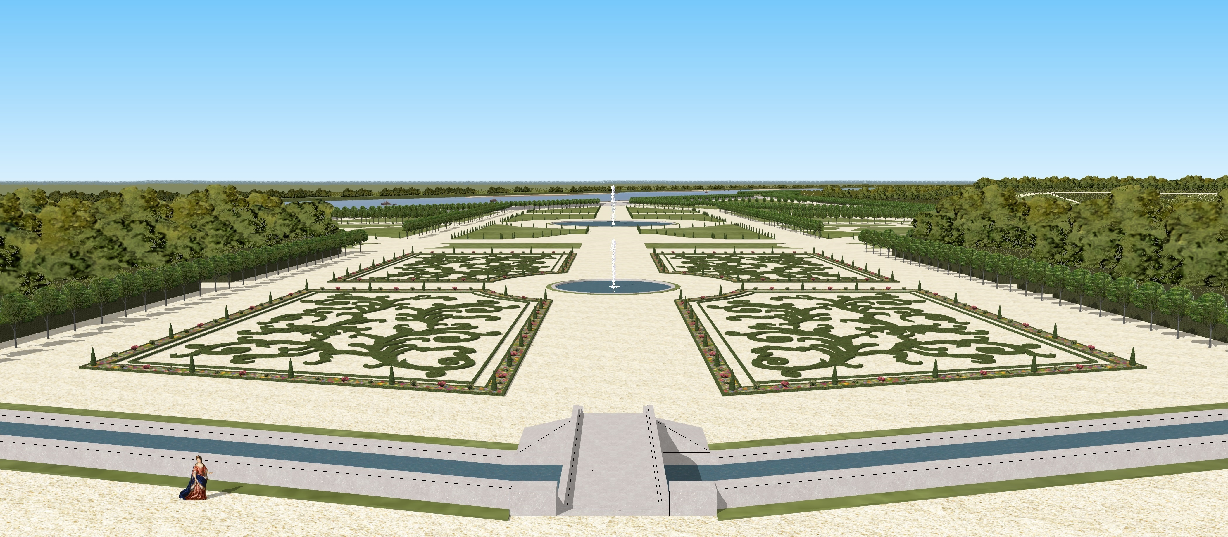 Grande perspective de Châteauneuf sur Loire vers 1700